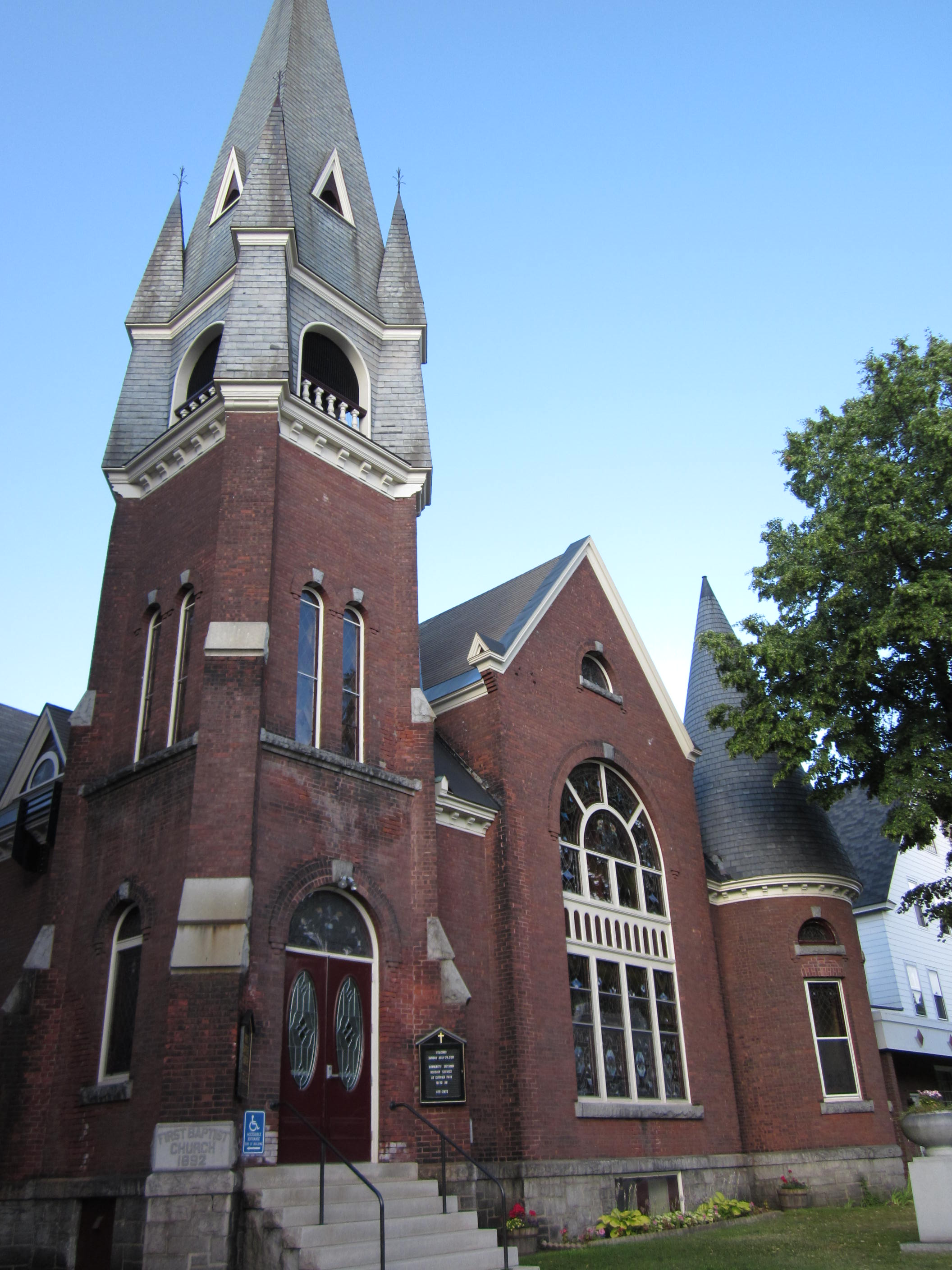 Church in Barre, Vermont